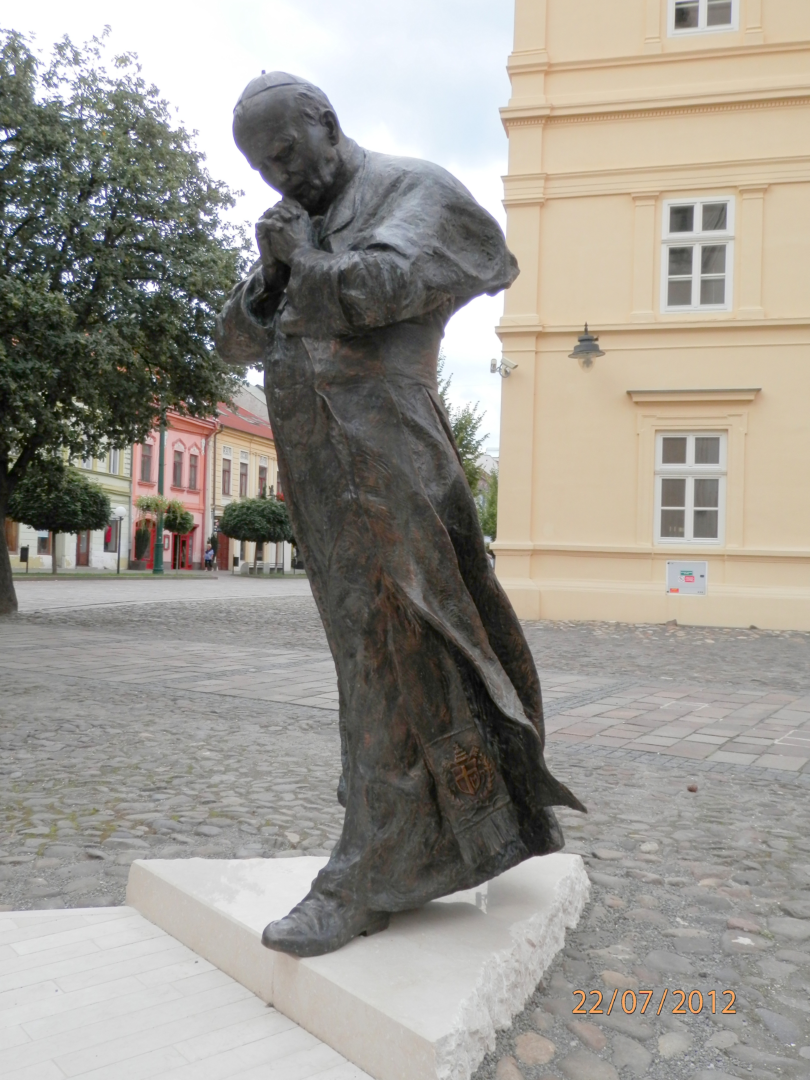 Socha pápeža Jána Pavla II.Mesto Prešov